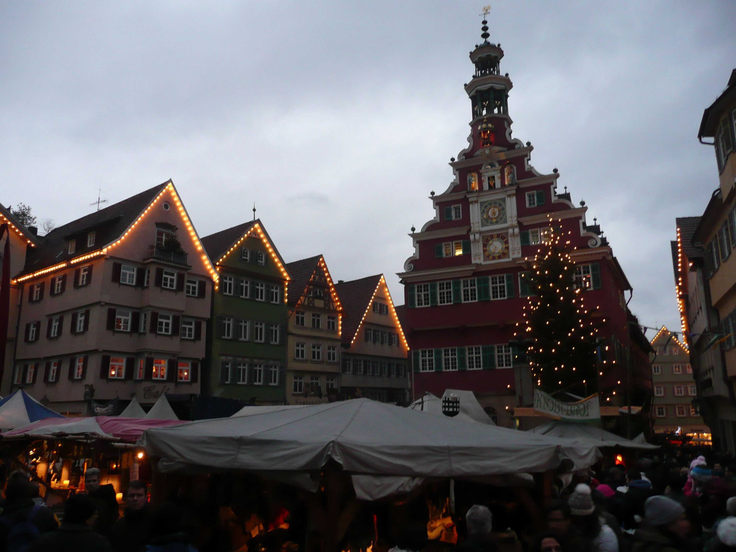 Esslinger Mittelaltermarkt & Weihnachtsmarkt mit Blick auf das "Alte Rathaus"